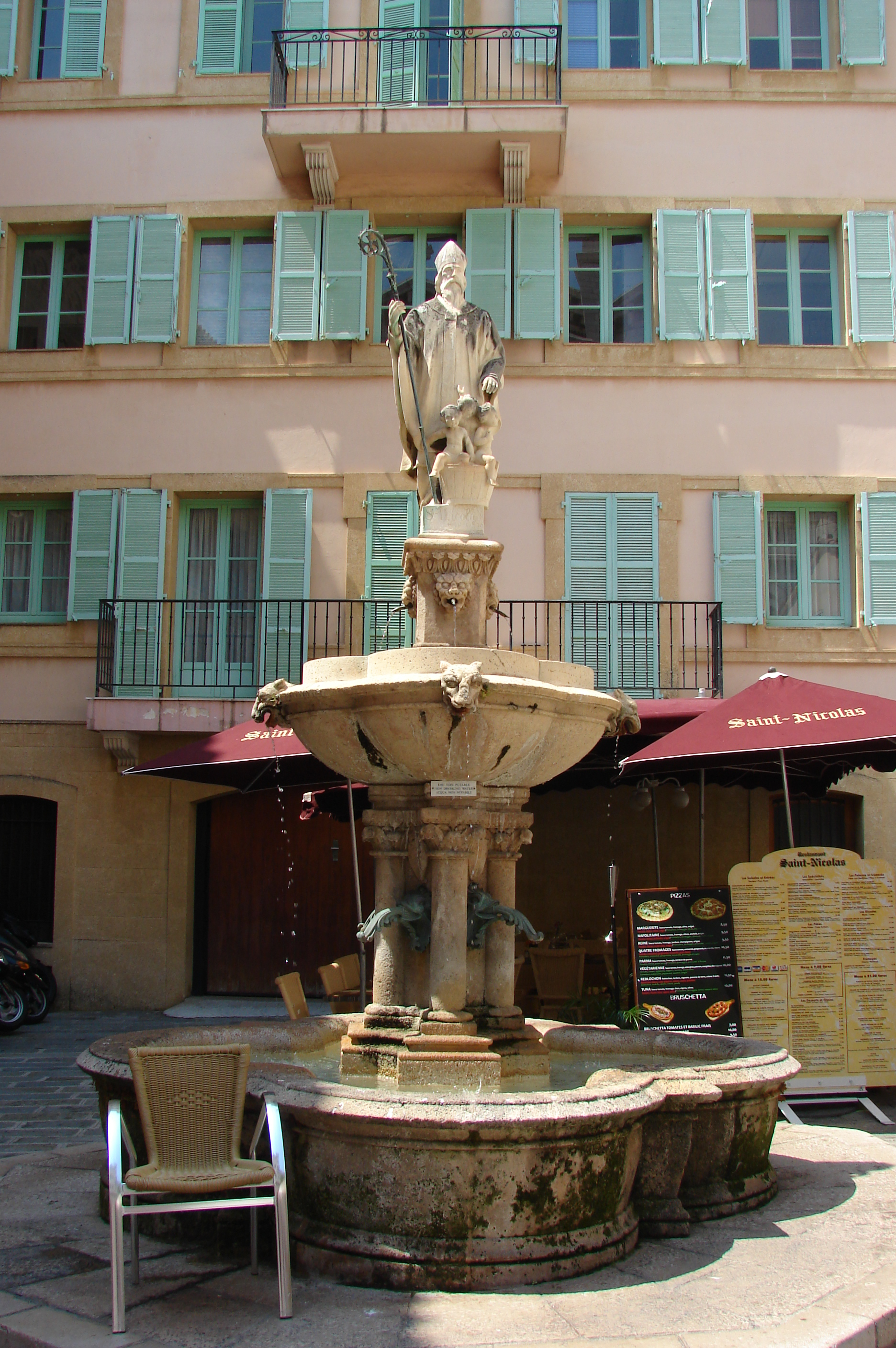 Monaco